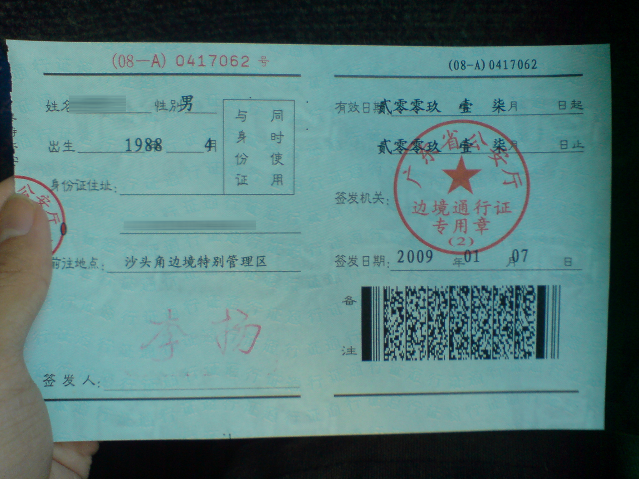 中文（中国大陆）: 边境特别管理区通行证内页